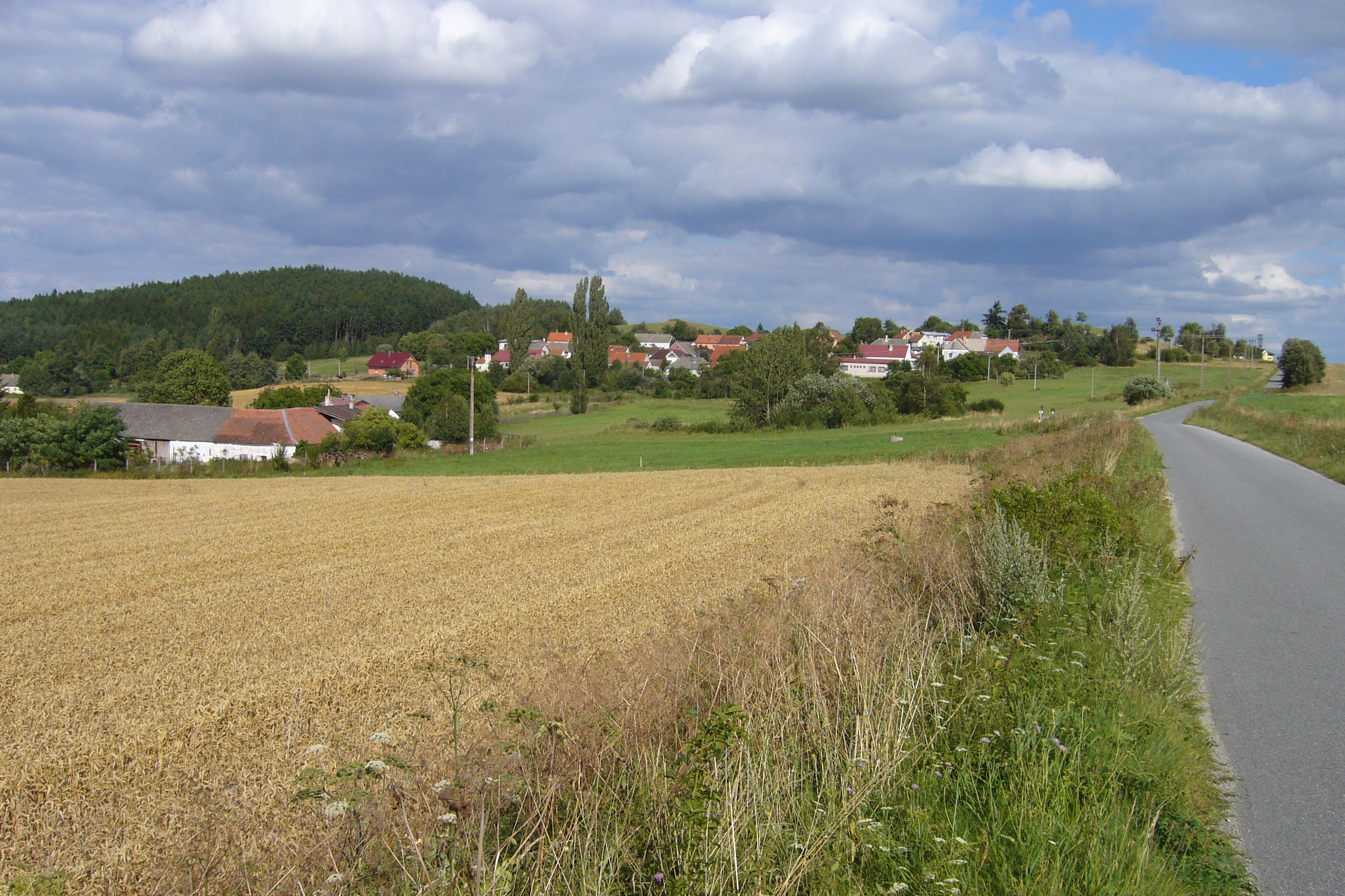 Celkový pohled od západu